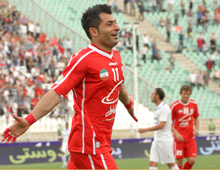 محمد ابراهیمی بازیکن تراکتور